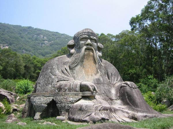 Laozi